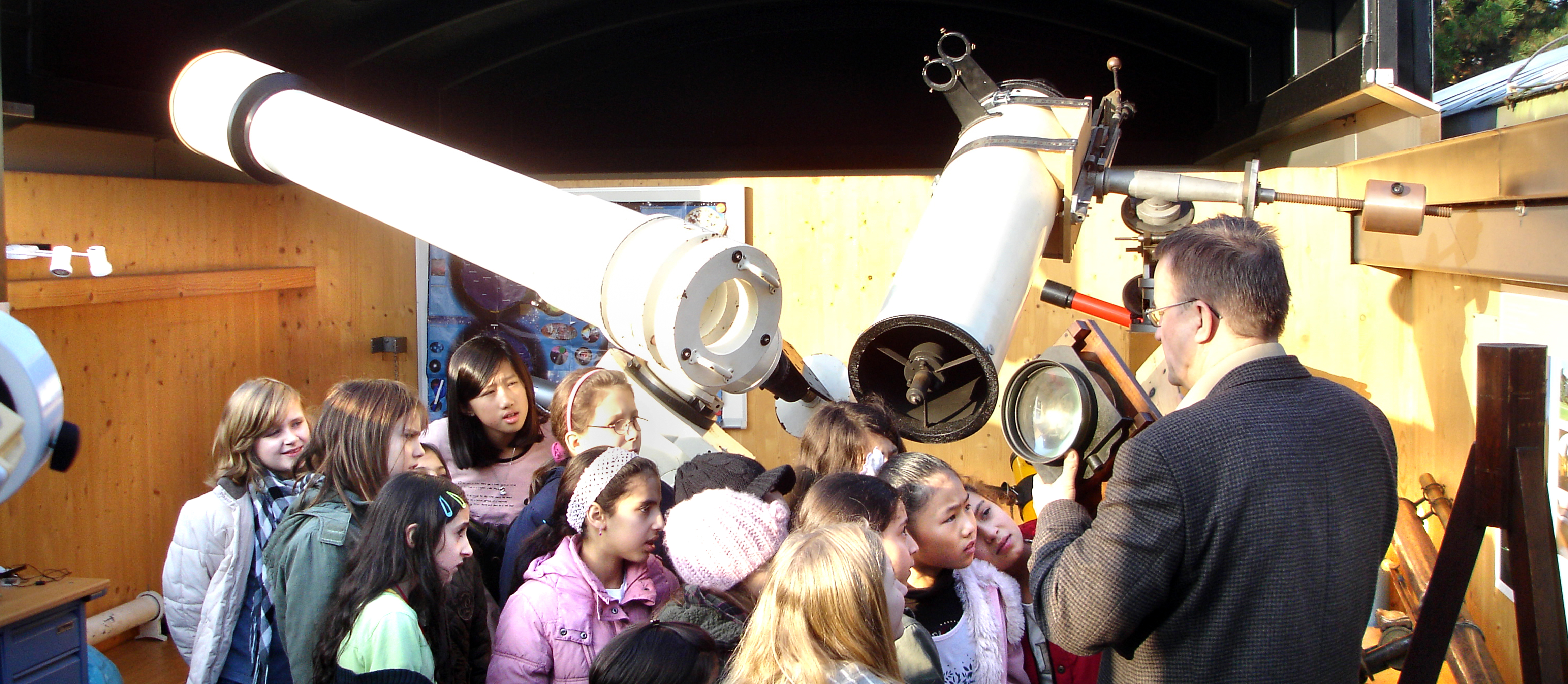 Schloß-Gymnasium Sternwarte